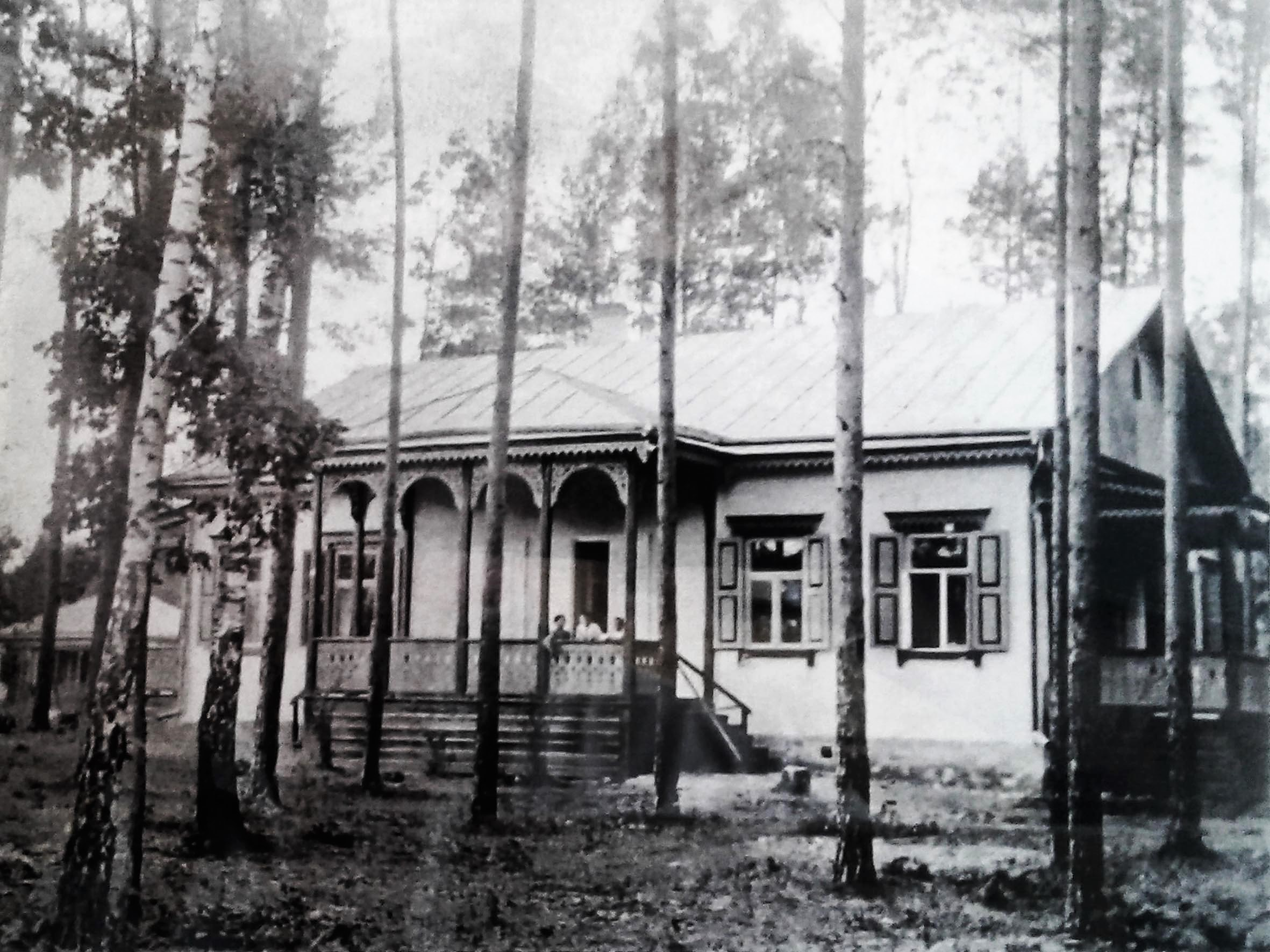 Дача Лятошинських у Ворзелі